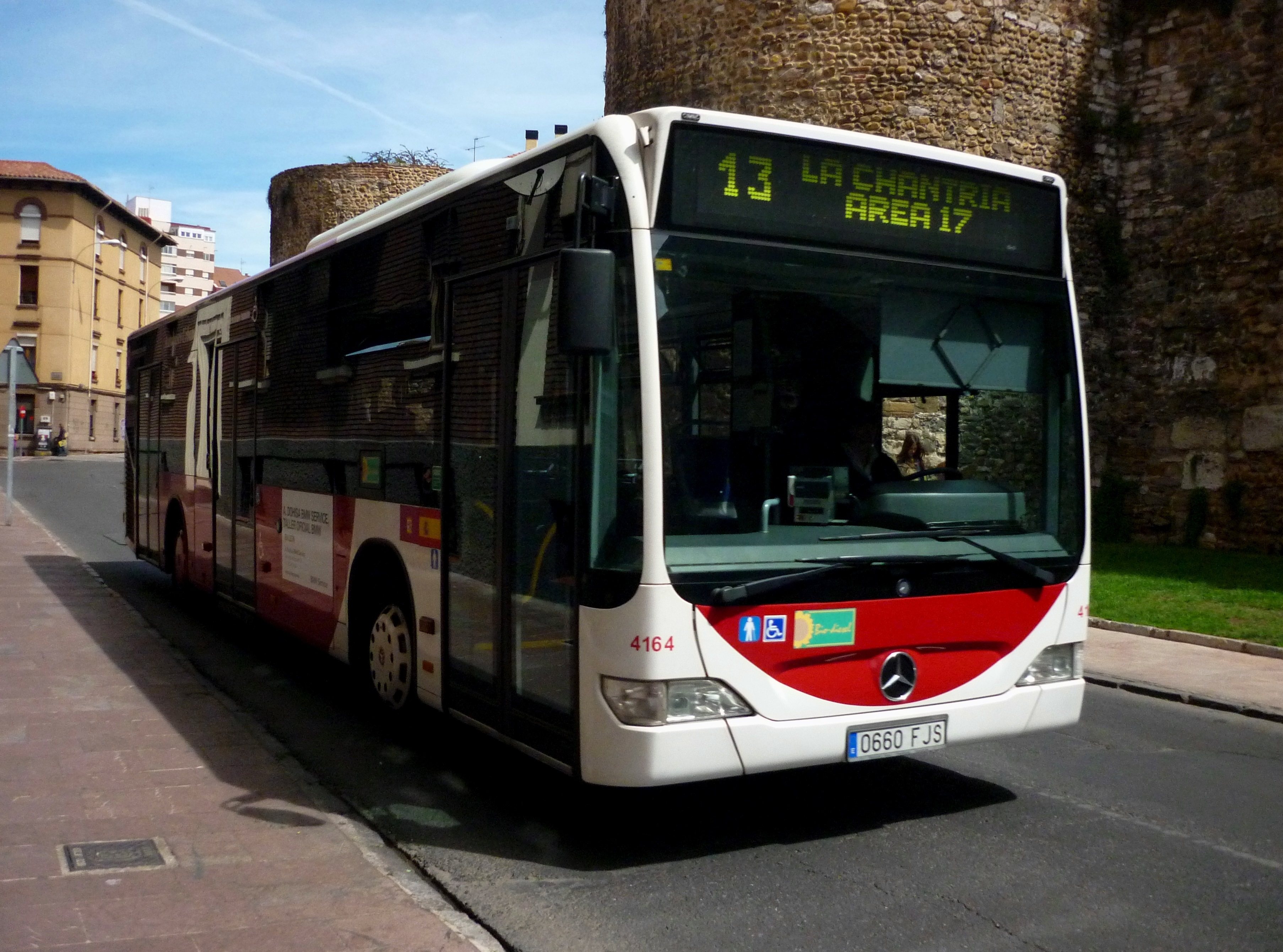 ALSA 4164